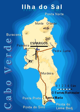 Kartographie: Lucete Fortes / Pitt Reitmaier Design. Pitt Reitmaier Karte vom Urheber hochgeladen